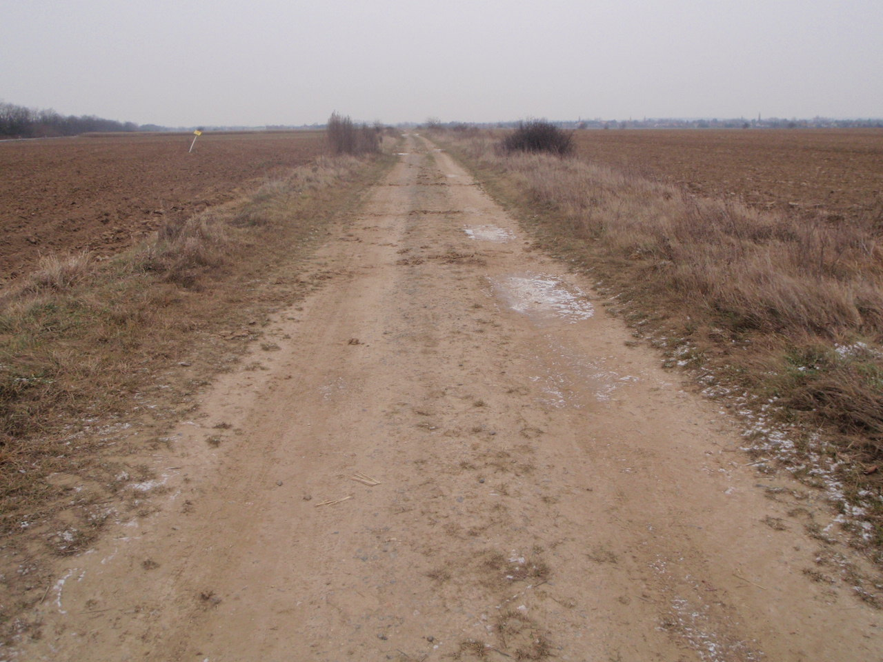 Bersteinstraße bei Gyöngyösfalu, heute Güterweg bis B87 Günser Strasse